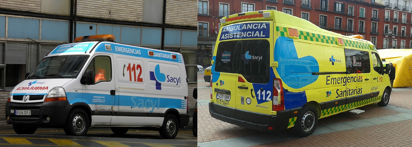 Comparación